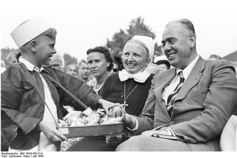 Innere Mission und Evangelisches Hilfswerk in Urdenbach. Freizeit (auf der Gemeindewiese Angerstraße) für hungergeschädigte Kinder aus Flüchtlingslagern. - Abschluß mit Kreispfarrer Ernst Schmittat und Schwester Amalie (Innere Mission Düsseldorf), 1950 (Juli). - Nach vier Wochen wieder ein "blühendes Aussehen".